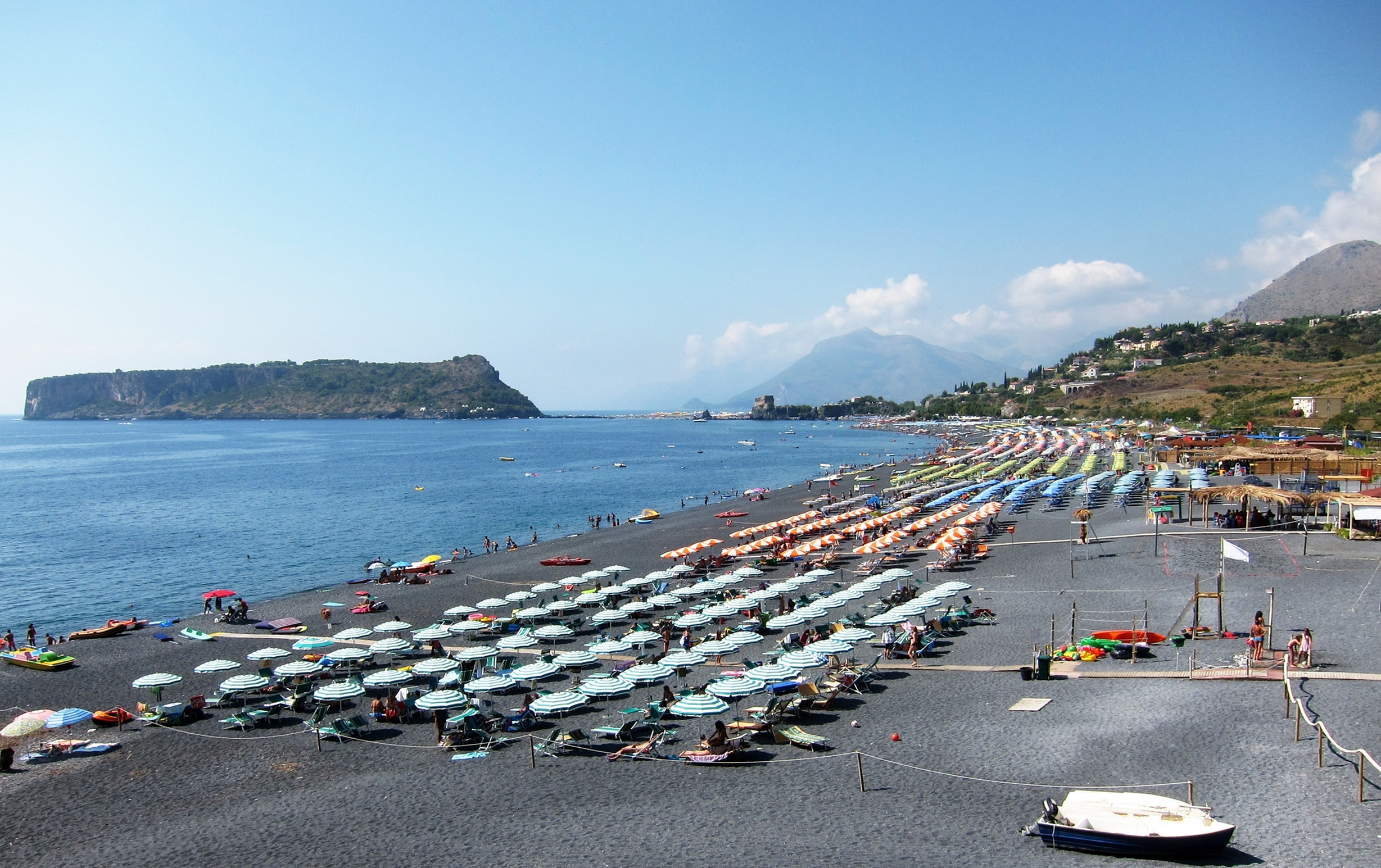 L'Isola di Dino à Praia a Mare (Calabre).